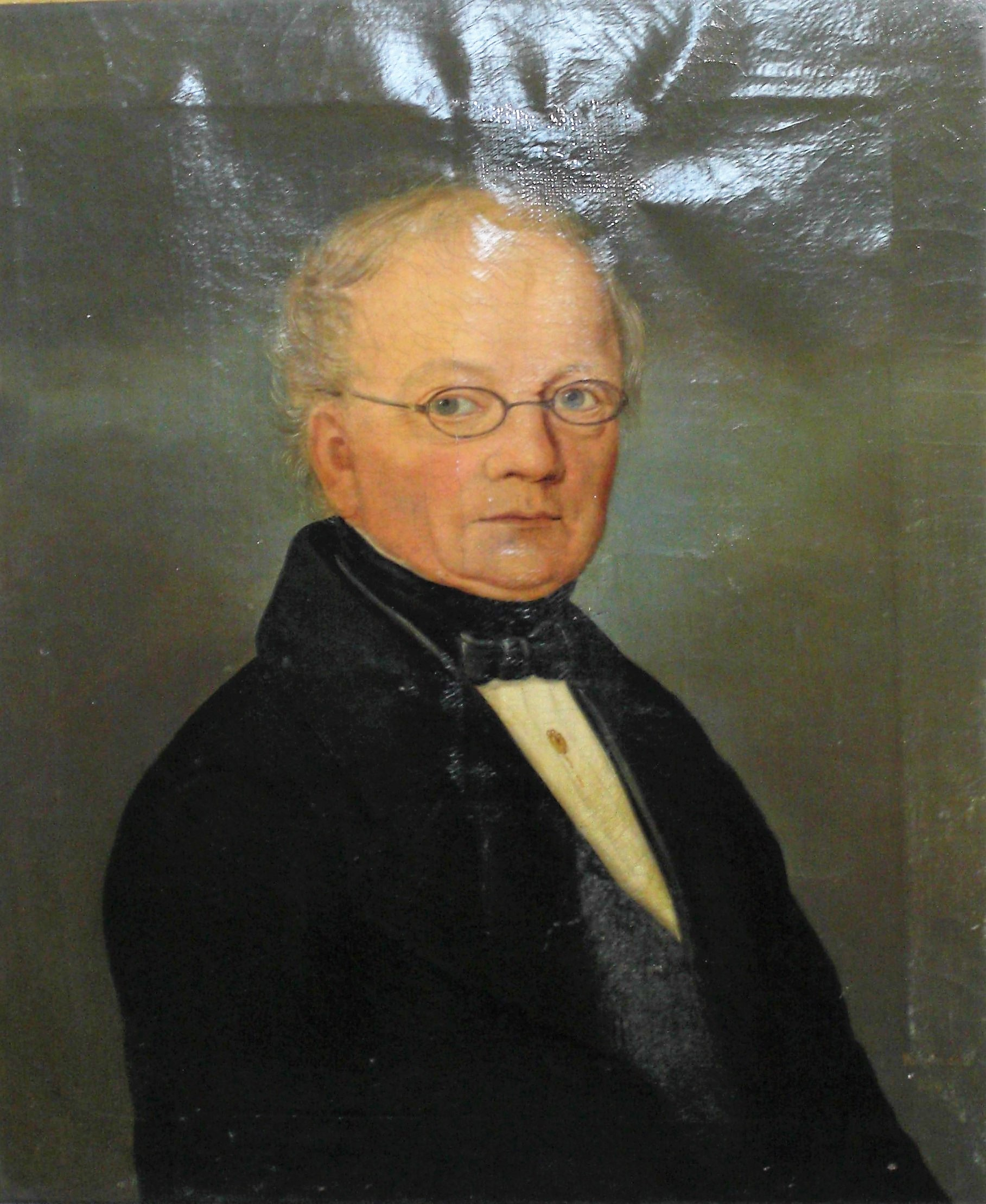 Doktor med. Andreas Primus (1782-1849) Babenhausen